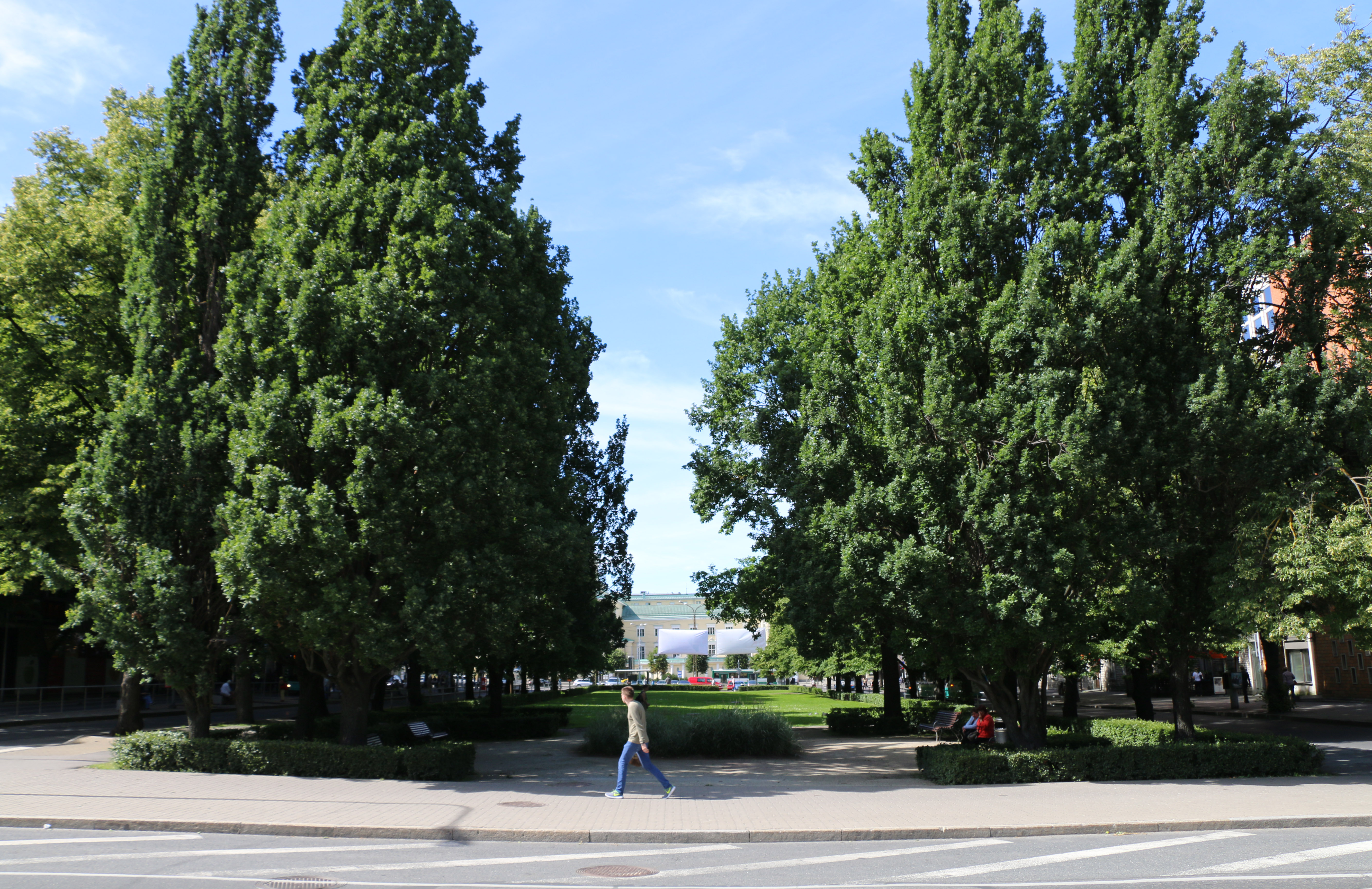 Teatri väljak Islandi väljaku poolt